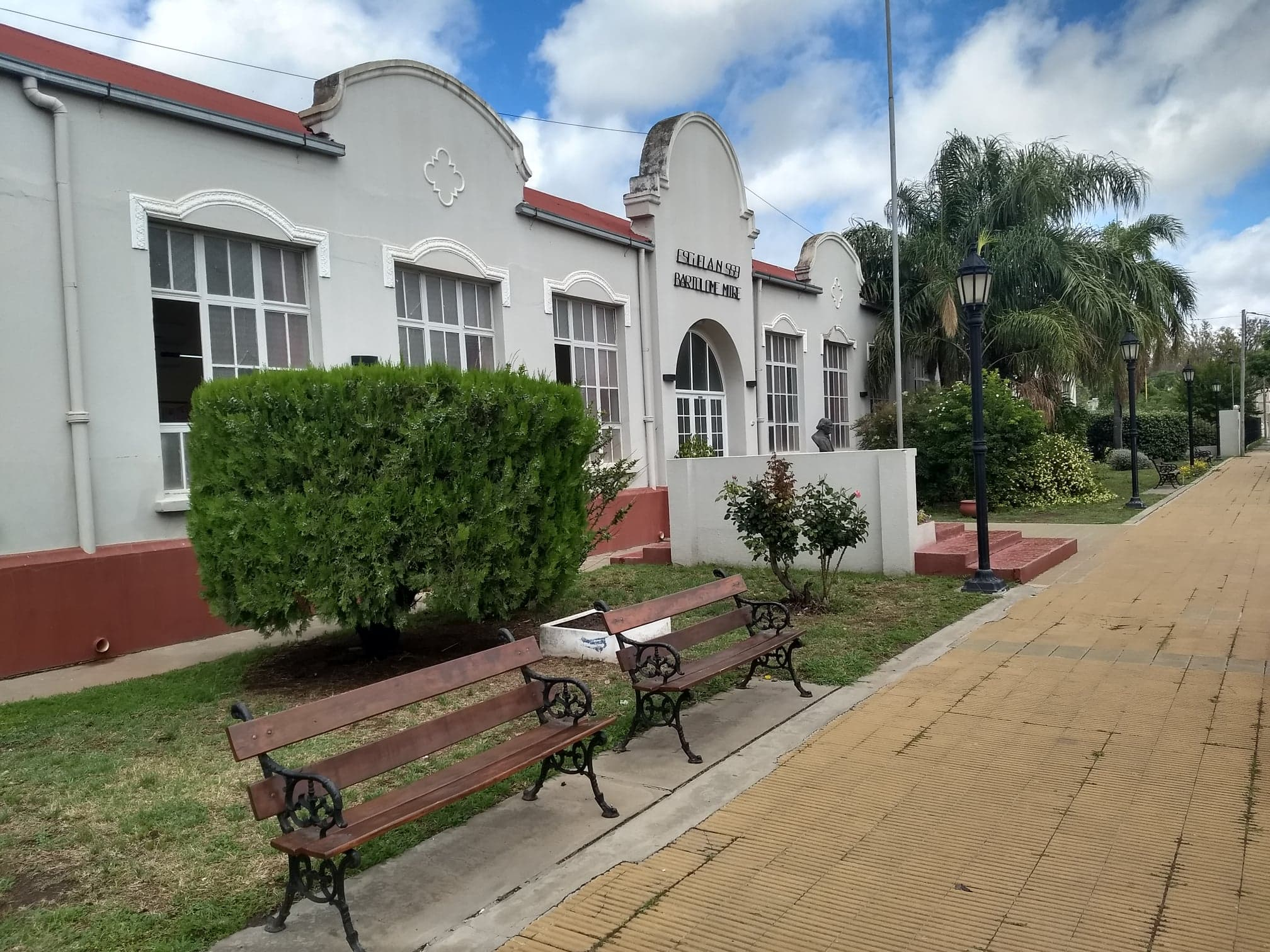 Se desarrolla en los turnos mañana y tarde